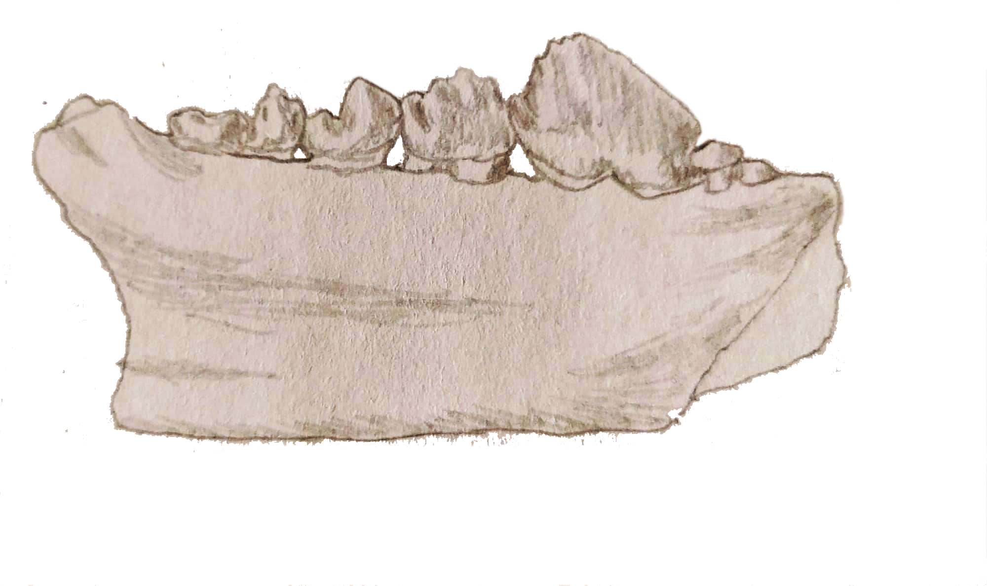 Carpodaptes aulacodon mandible